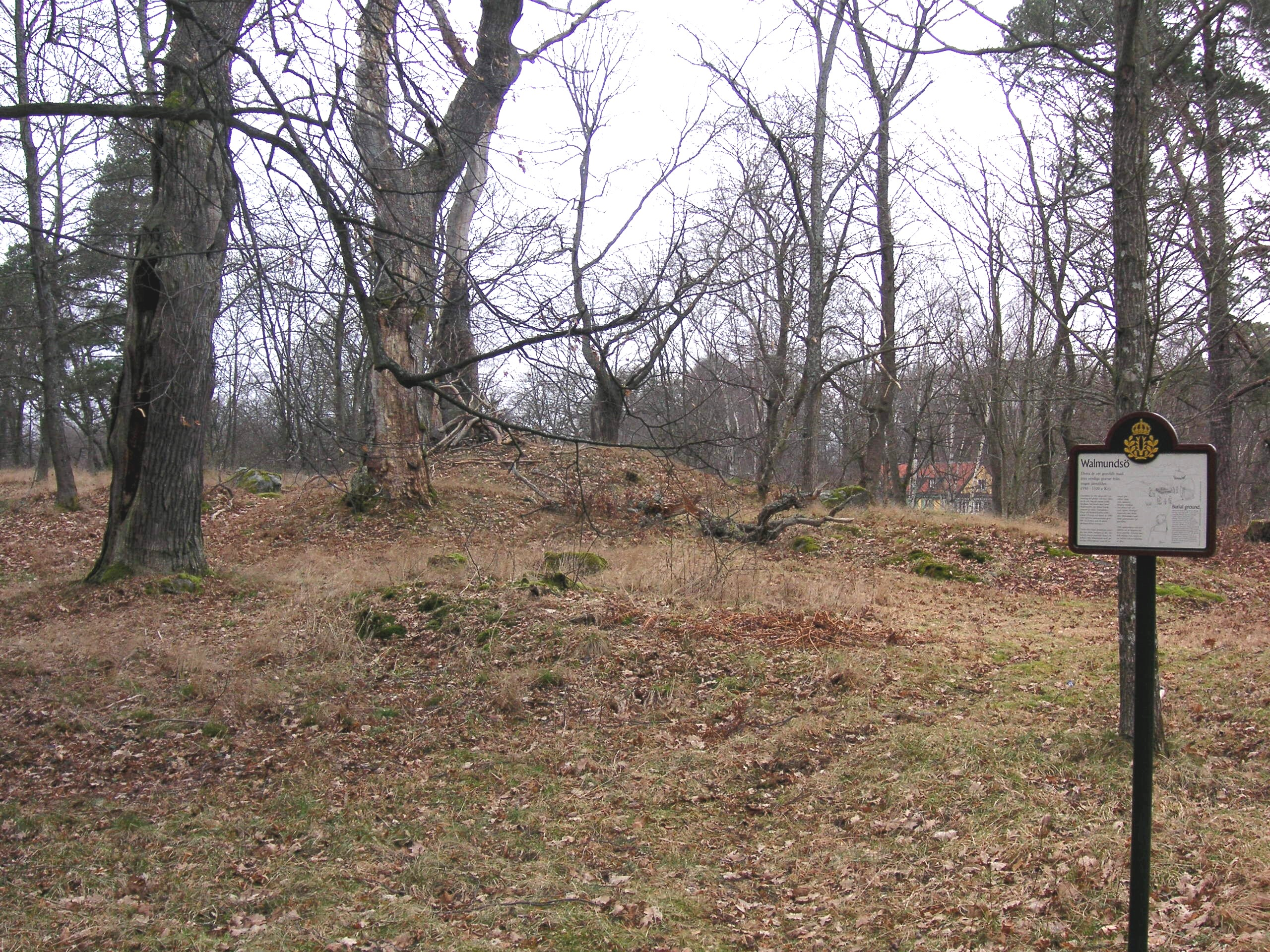 Järnåldersgravhögar "Walmundsö" på Djurgården i Stockholm